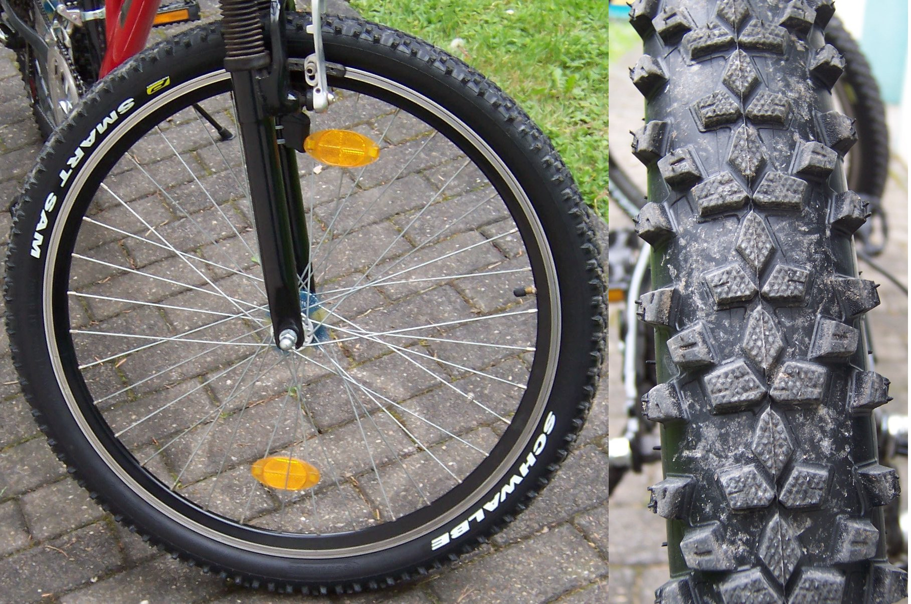 54-559 Schwalbe Smart Sam Tire